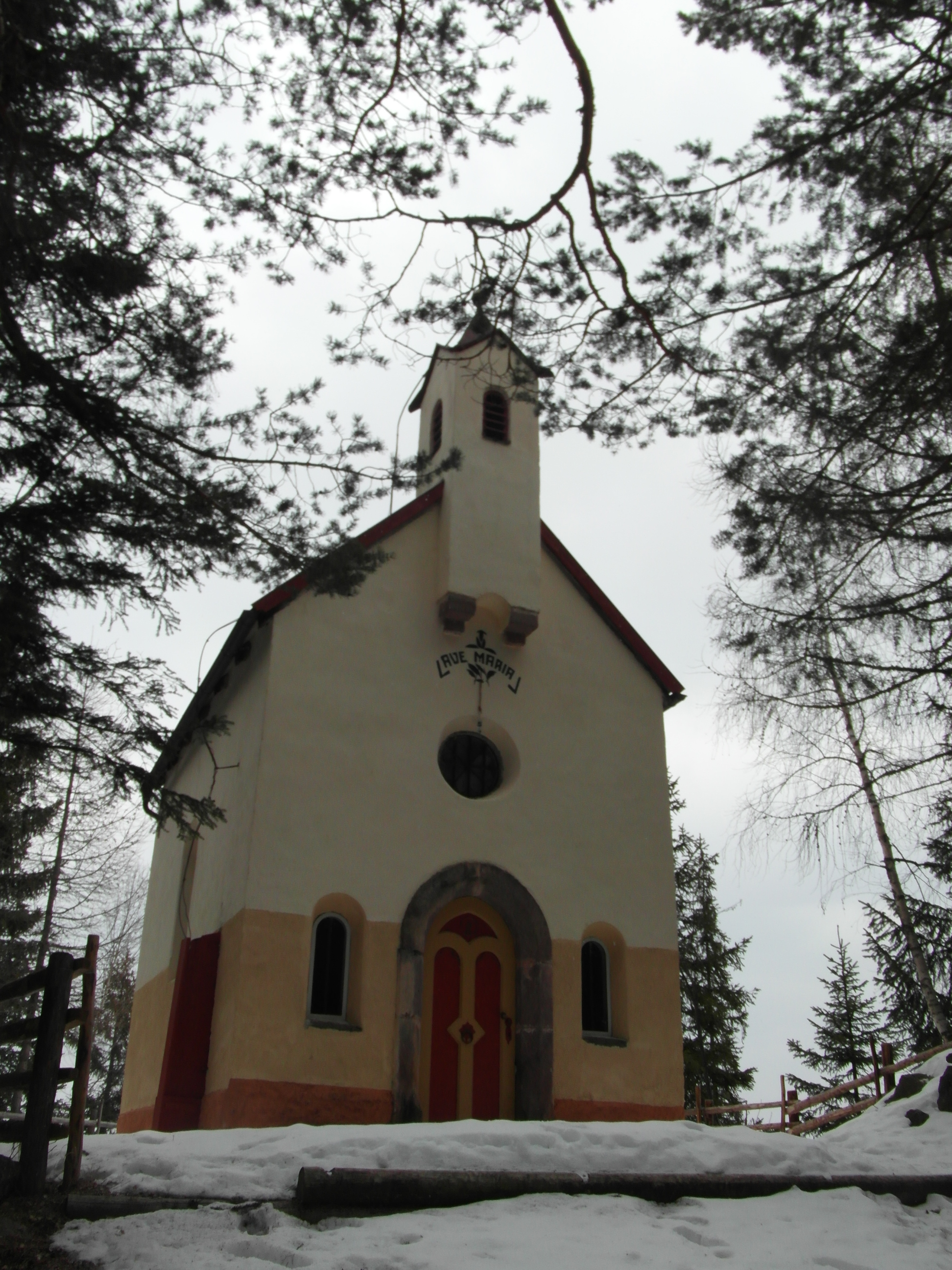 Cappella San Leonardo